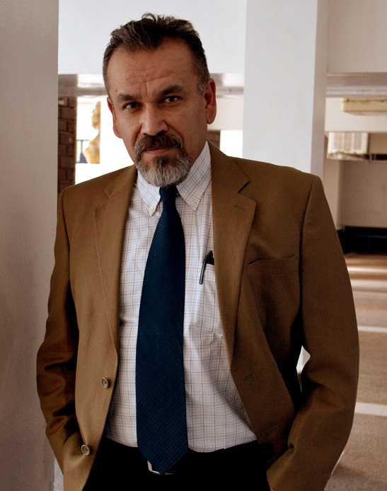 Jaime Muñoz Vargas, escritor nacido en la Comarca Lagunera (Durango y Coahuila, México), el 23 de mayo de 1964.